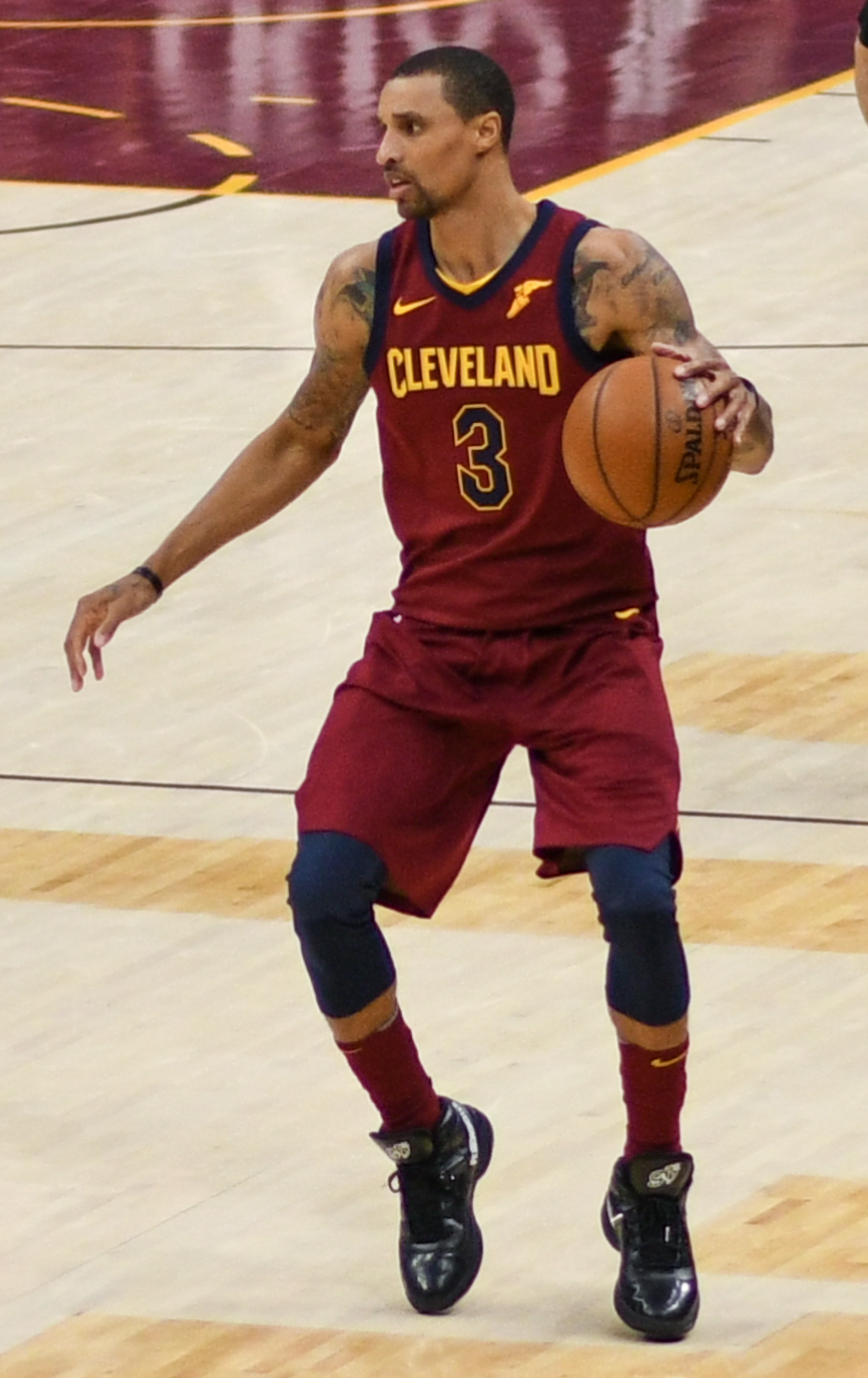 George Hill